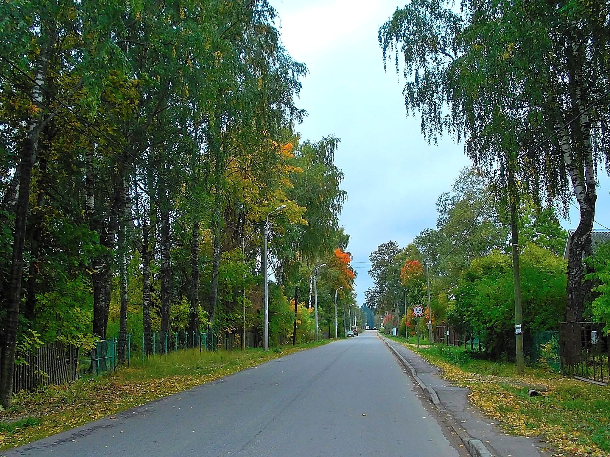 Улица Стахановская в Новосиверской